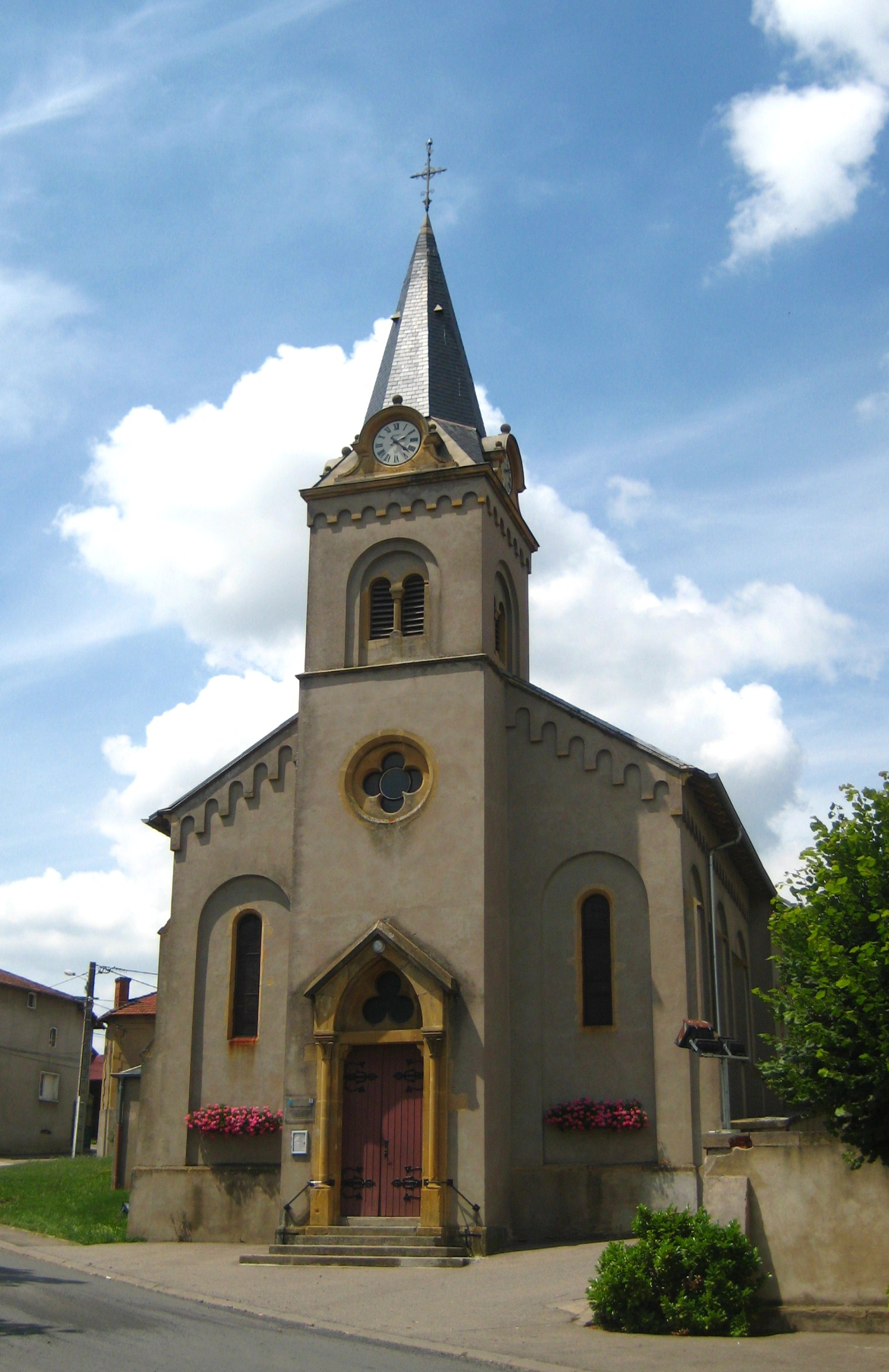 Description Église de Verny Date25 June 2009Sourcemon appareil photoAuthorAimelaime Église de Verny